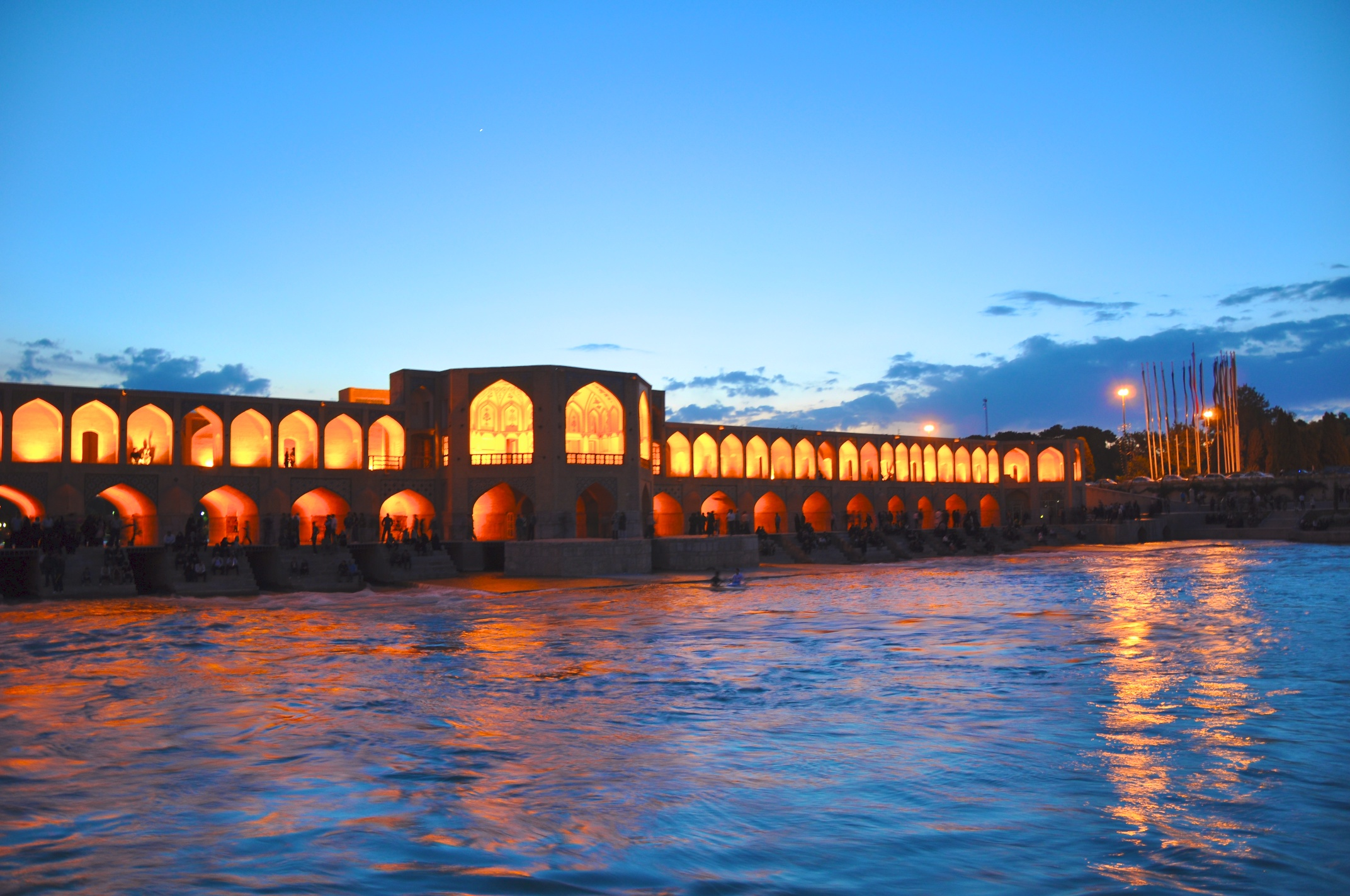 Khajou Bridge on Zayandeh Rud, Isfahan